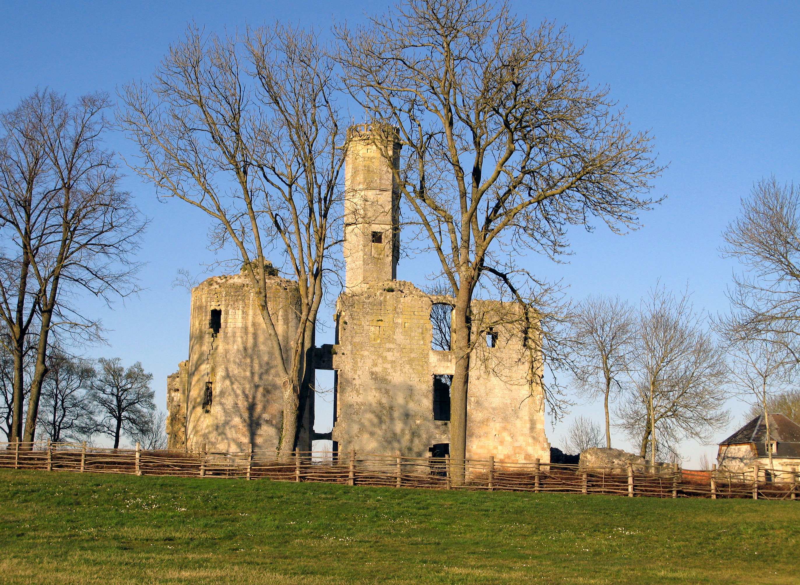 Folleville (Somme, France) - Les vestiges du château, vus depuis le parking (entre le cimetière et l'église). . .